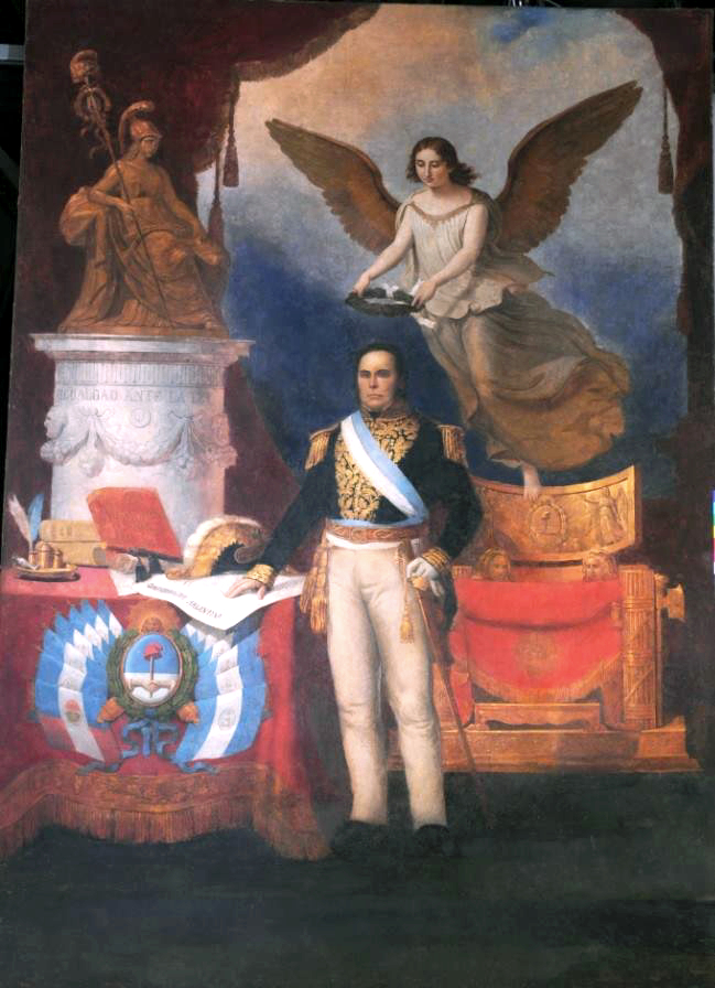 Baldassare Verazzi - Retrato alegórico del Gral. Justo José de Urquiza, el cual fue rechazado de plano por éste, dado que había sido realizado sin su permiso.